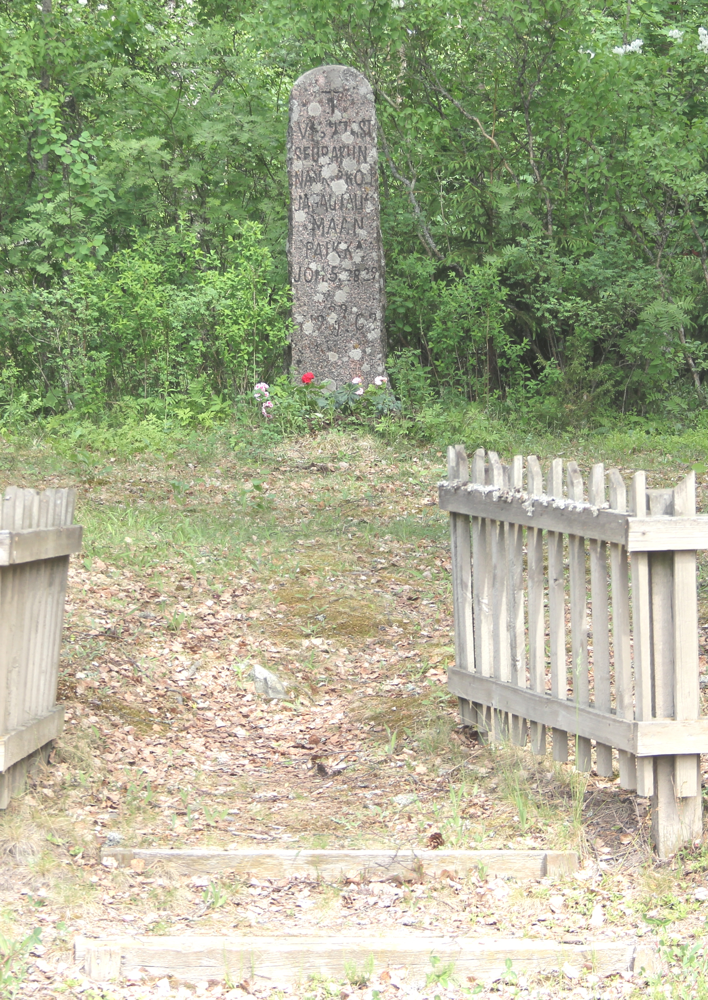 Laidiken (Laidikkeen) kirkon muistokivi, Laidike, Suomusjärvi, Salo